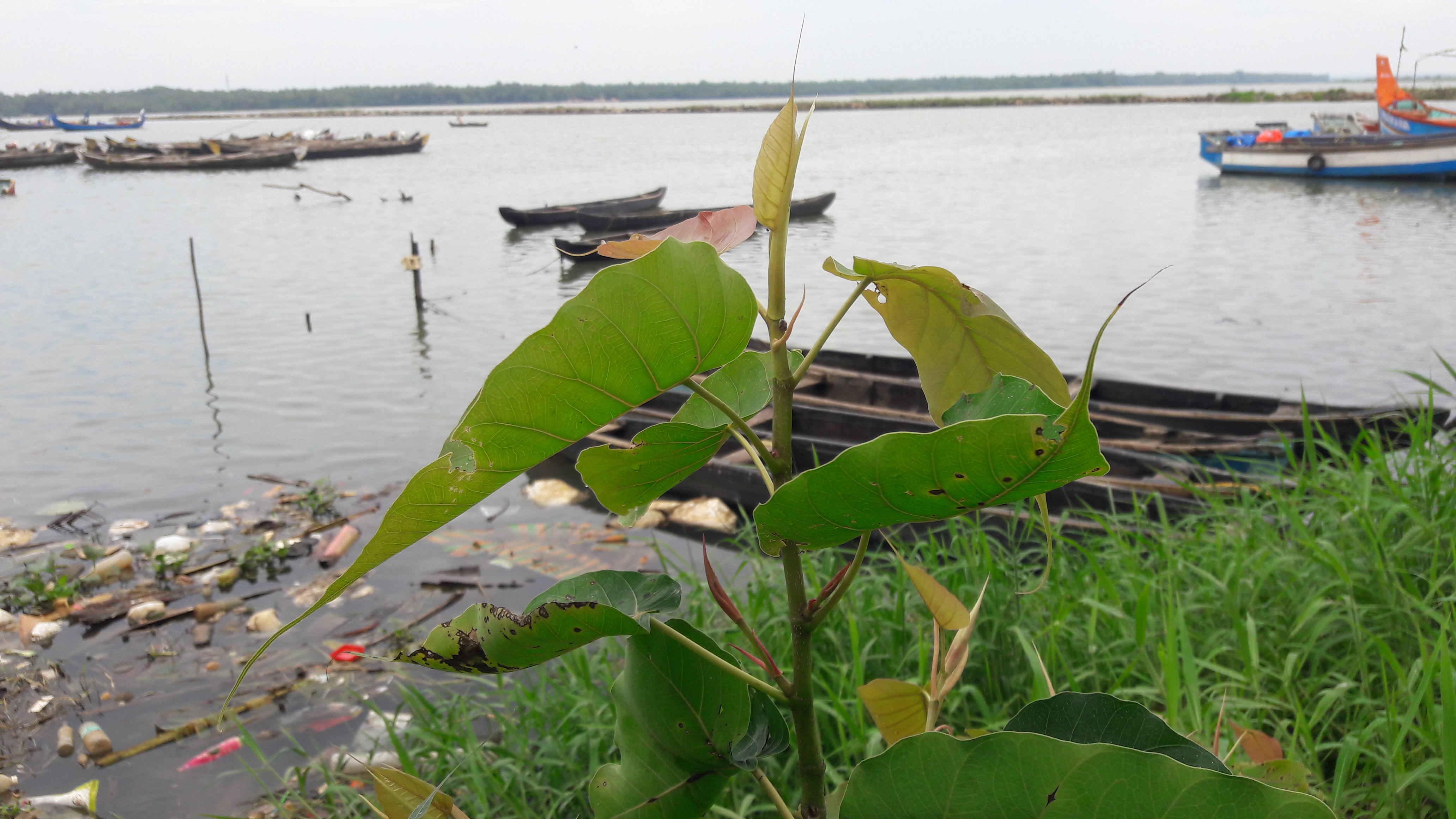 പൊന്നാനി ഭാരതപ്പുഴ തീരത്ത് വളരുന്ന ഒരു അരയാൽ. Peepal tree ശാസ്ത്രീയ നാമം - Ficus religiosa കുടുംബം - Moraceae.